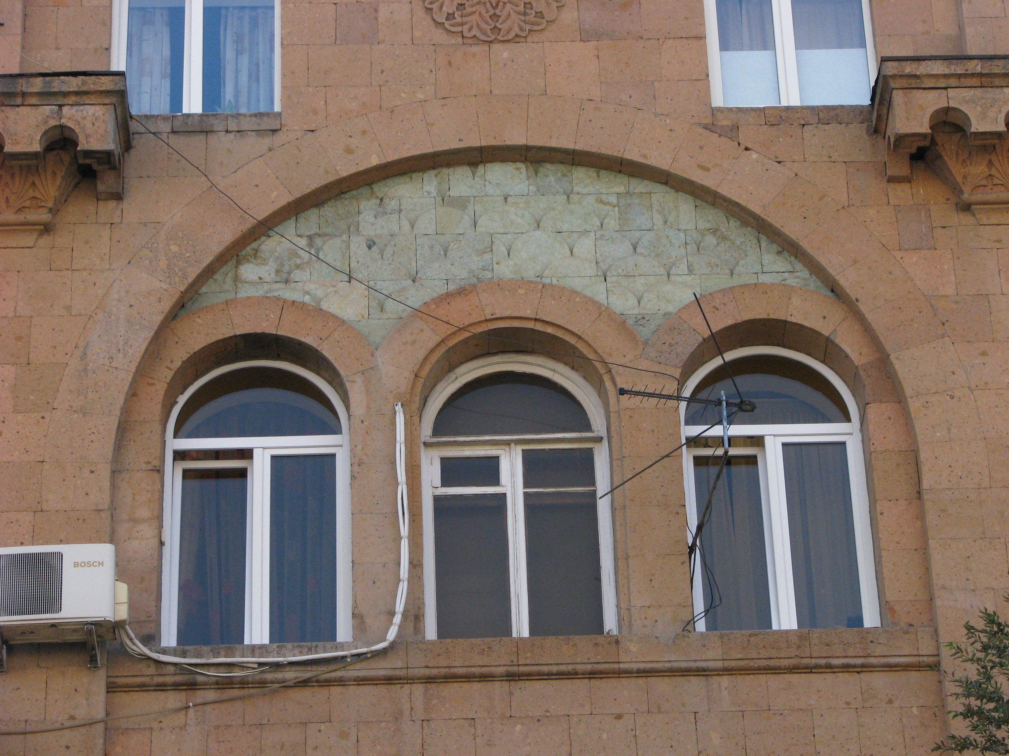 Բնակելի շենք Թումանյան 35 հասցեում 6/30